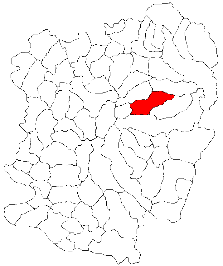 Categorie:Hărţi ale judeţului Caraş-Severin